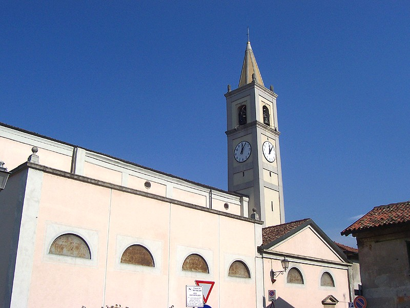 Truccazzano - Campanile della Chiesa Parrocchiale di S. Michele